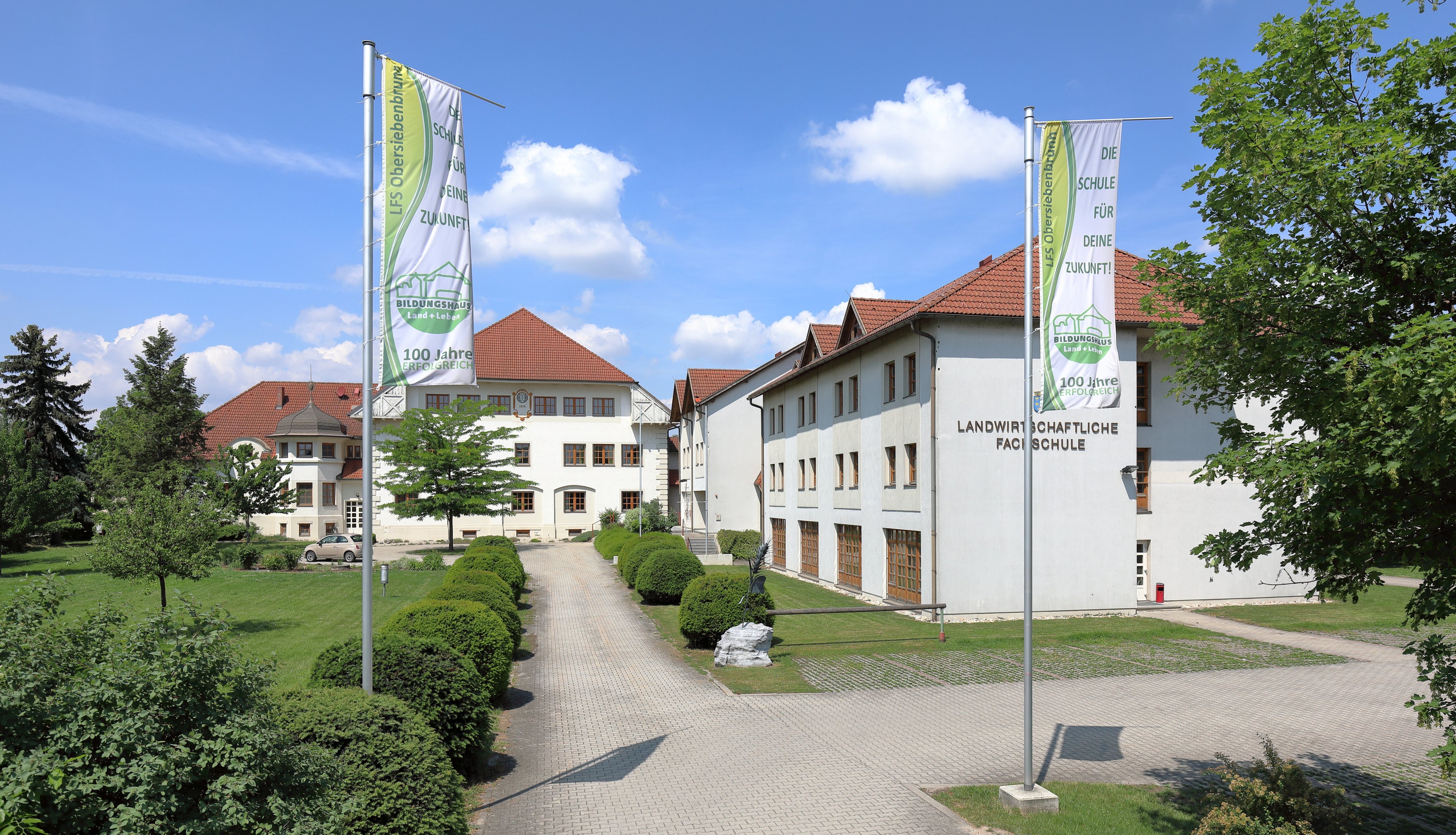 Der Eingangsbereich der Landwirtschaftlichen Fachschule in der niederösterreichischen Marktgemeinde Obersiebenbrunn.Das Hauptgebäude wurde 1913/14 errichtet und hat einen schlichten Heimatstildekor. Aktuell (2018) wird ein modulares Schulsystem angeboten, das bis zur Zulassung zur Meisterprüfung führt.